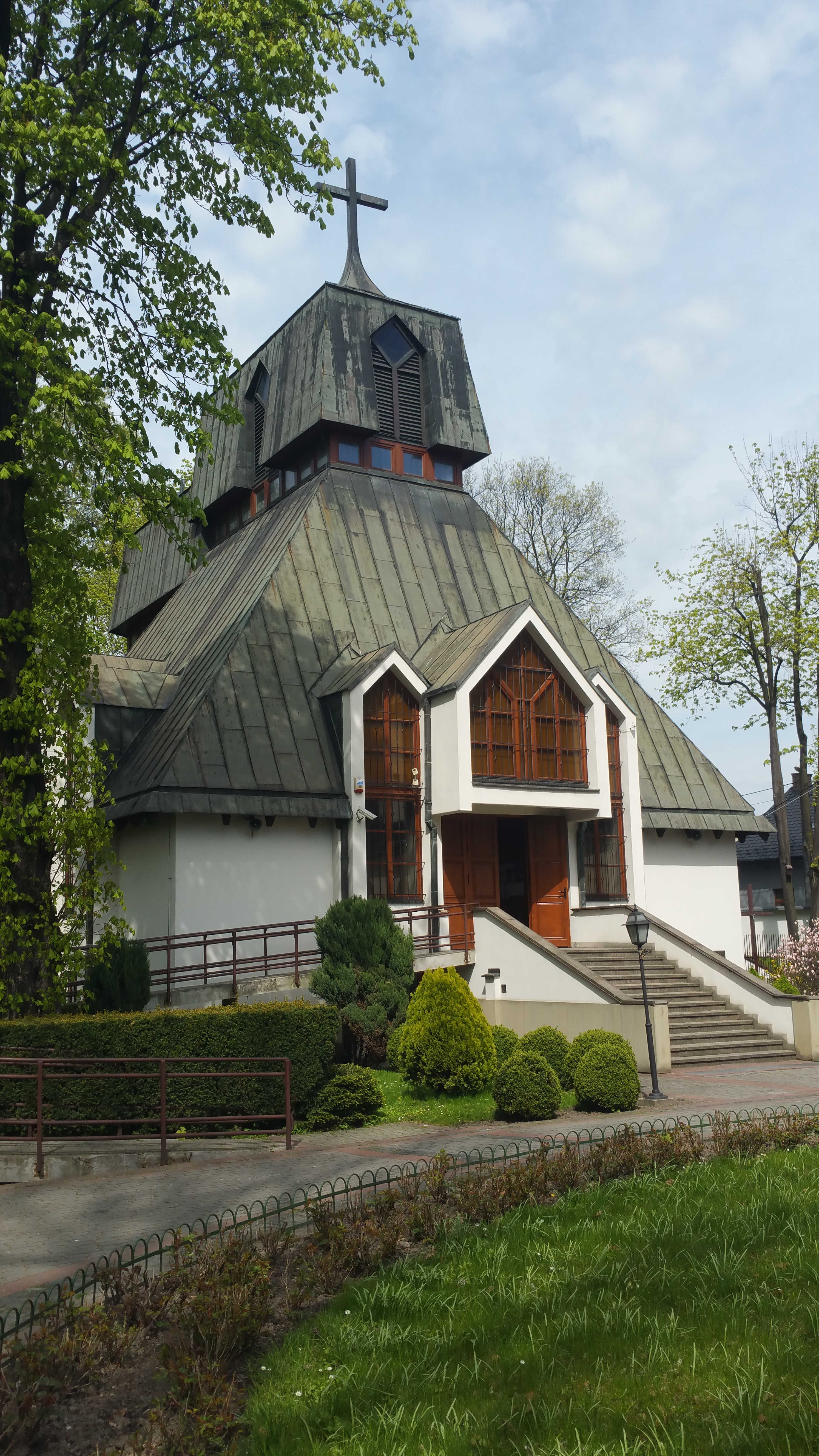 Kirche des Sanktuariums "Ecce Homo" in Kraków (Krakau)